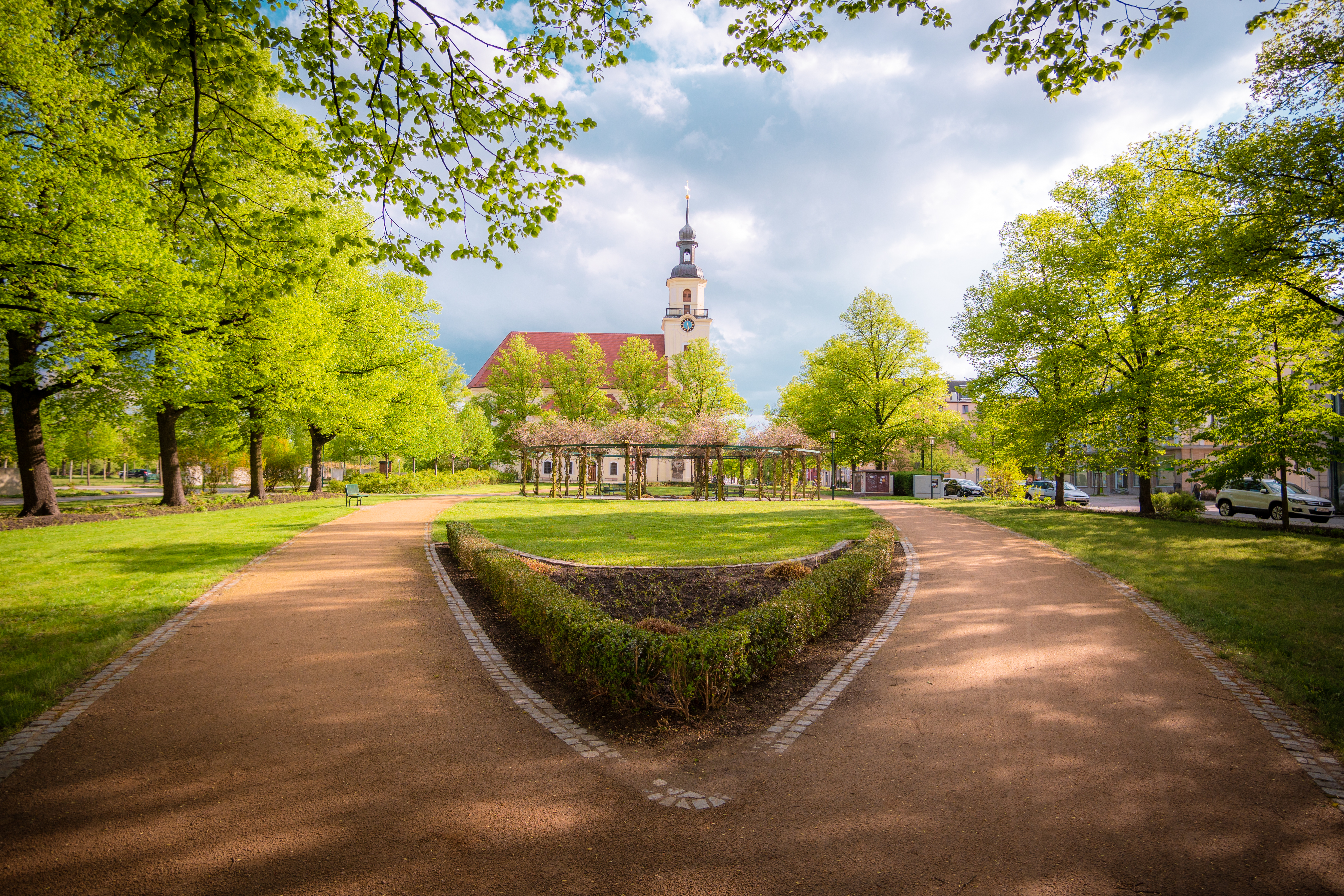 Stadtkirche St. Nikolai in Forst (Lausitz) mit einem Park im Vordergrund